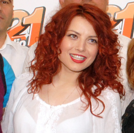 ELENA GHEORGHE & STEAUA DI VREARI @MATINALII 21